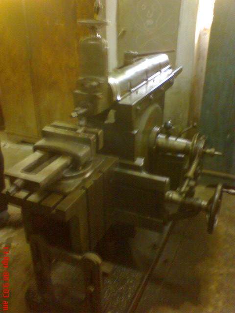 শ্যাপার মেশিন